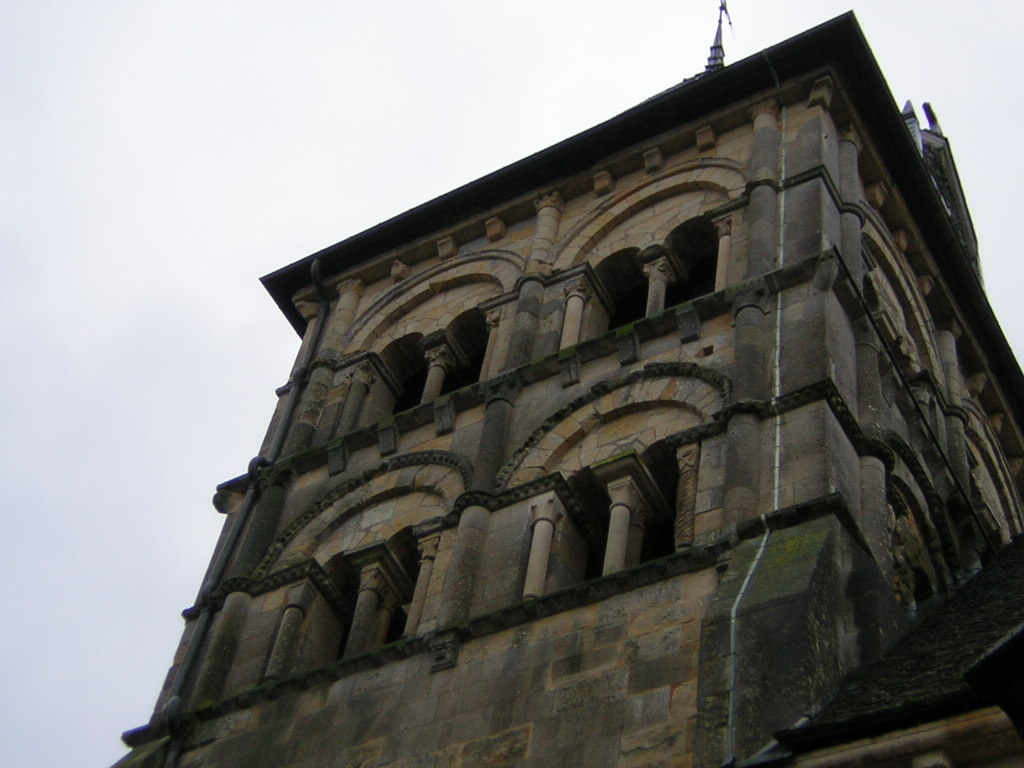 clocher de l'église de Marzy